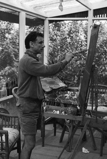 Antonio Vinciguerra all'opera nel suo studio a Maui, Hawaii, nel 1989